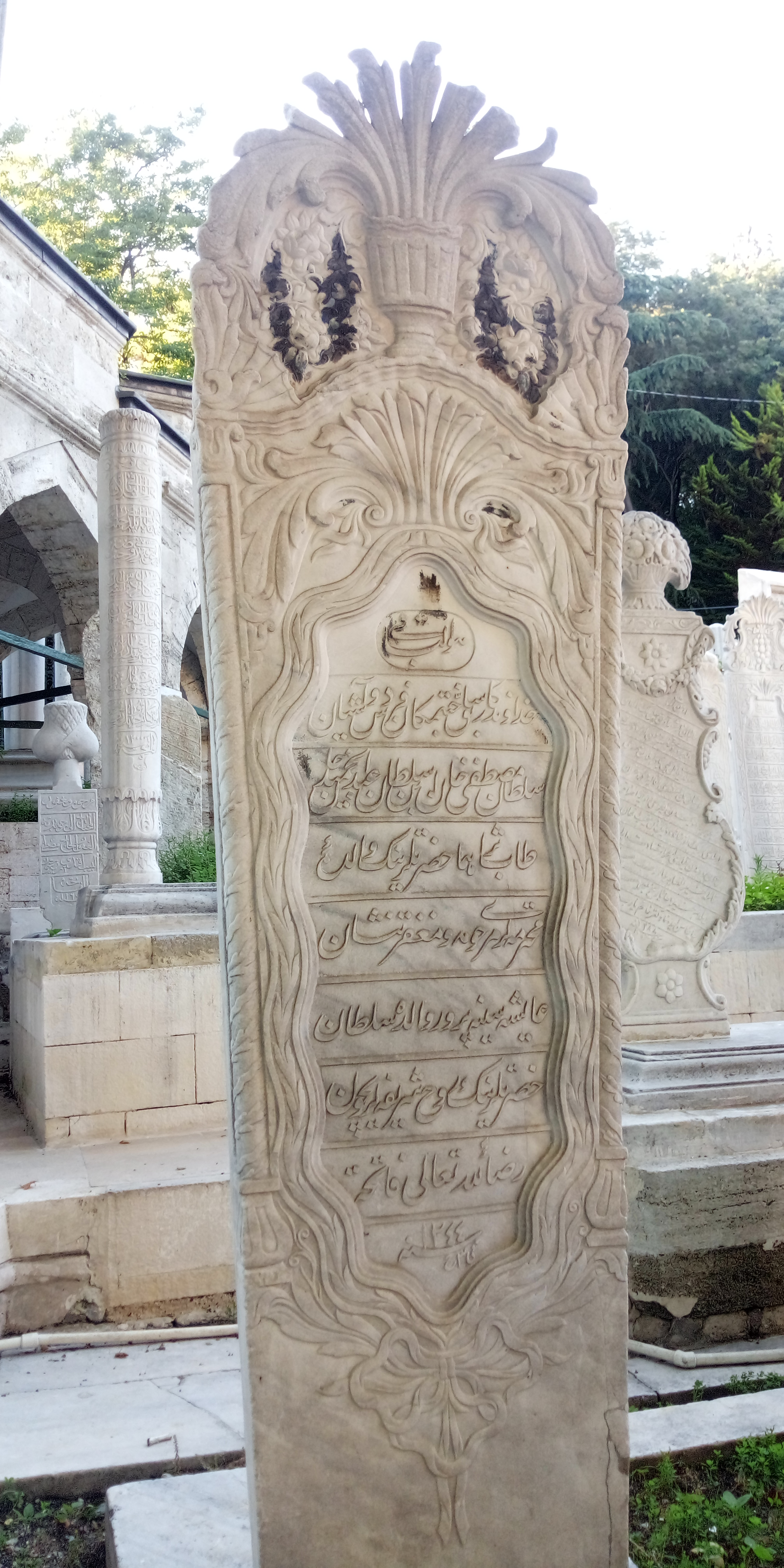 Ayşe Sineperver Sultan'ın Eyüp Sultan Cami Haziresinde Yer Alan Mezar Taşı